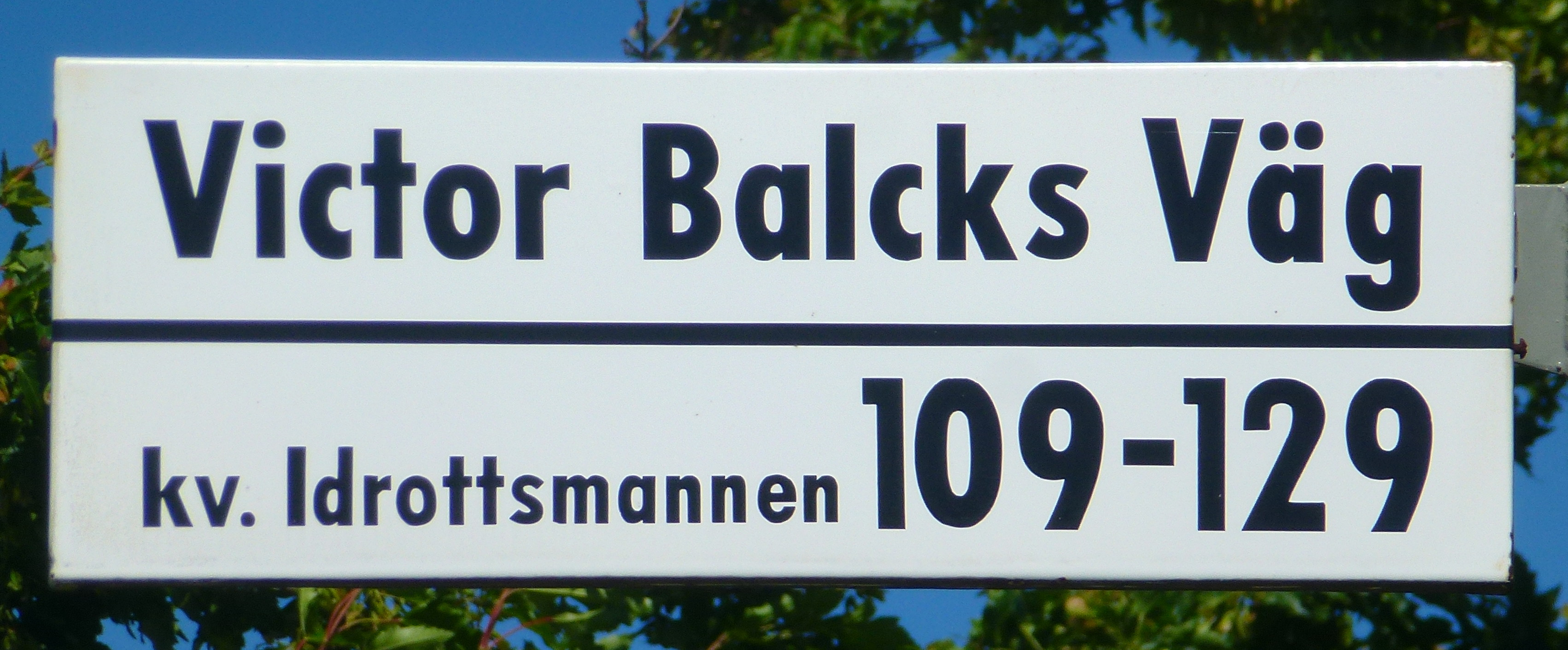 Victor Balcks väg - skylt